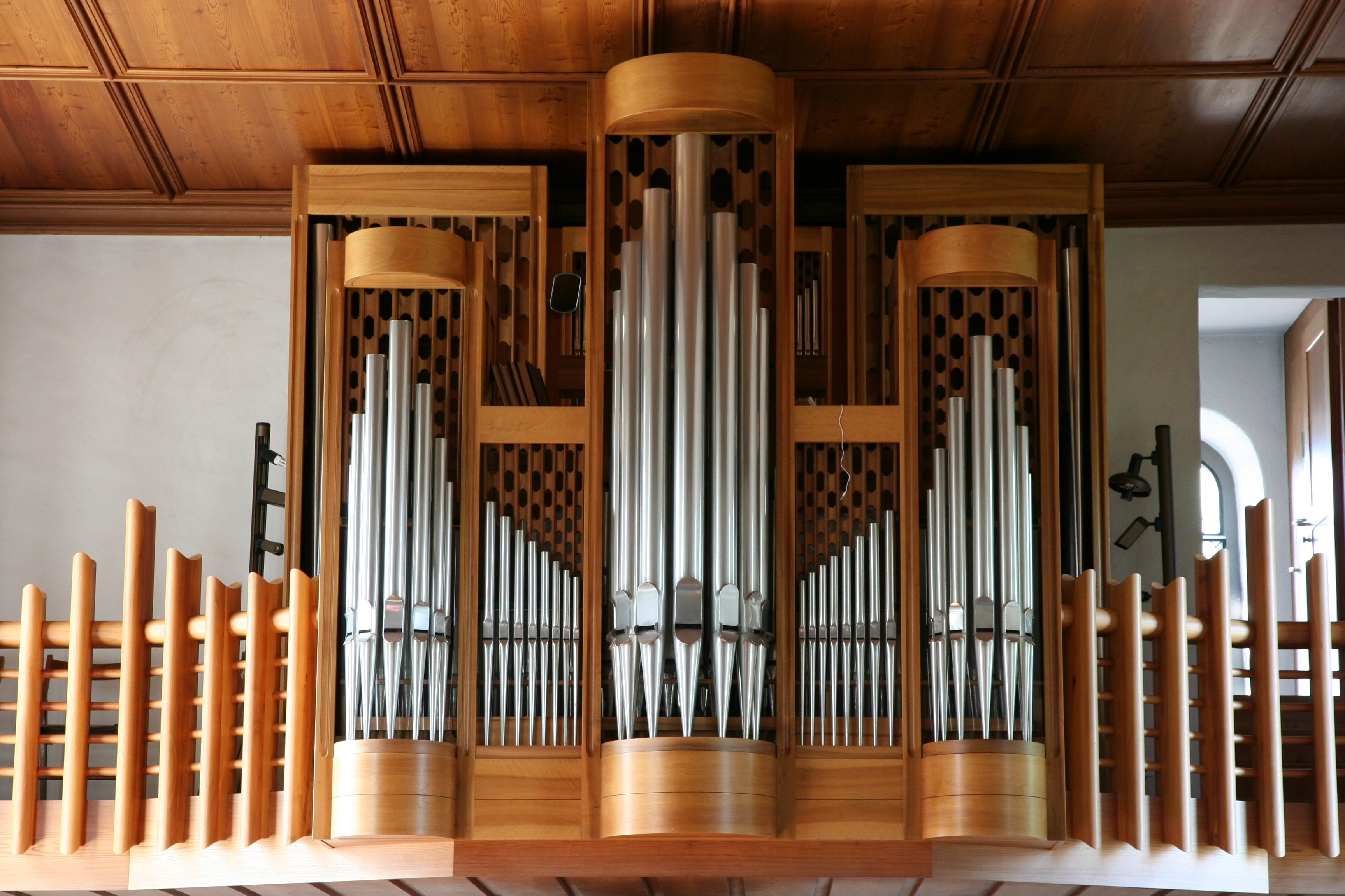 Evangelisch-reformierte Kirche Schwamendingen in Zürich